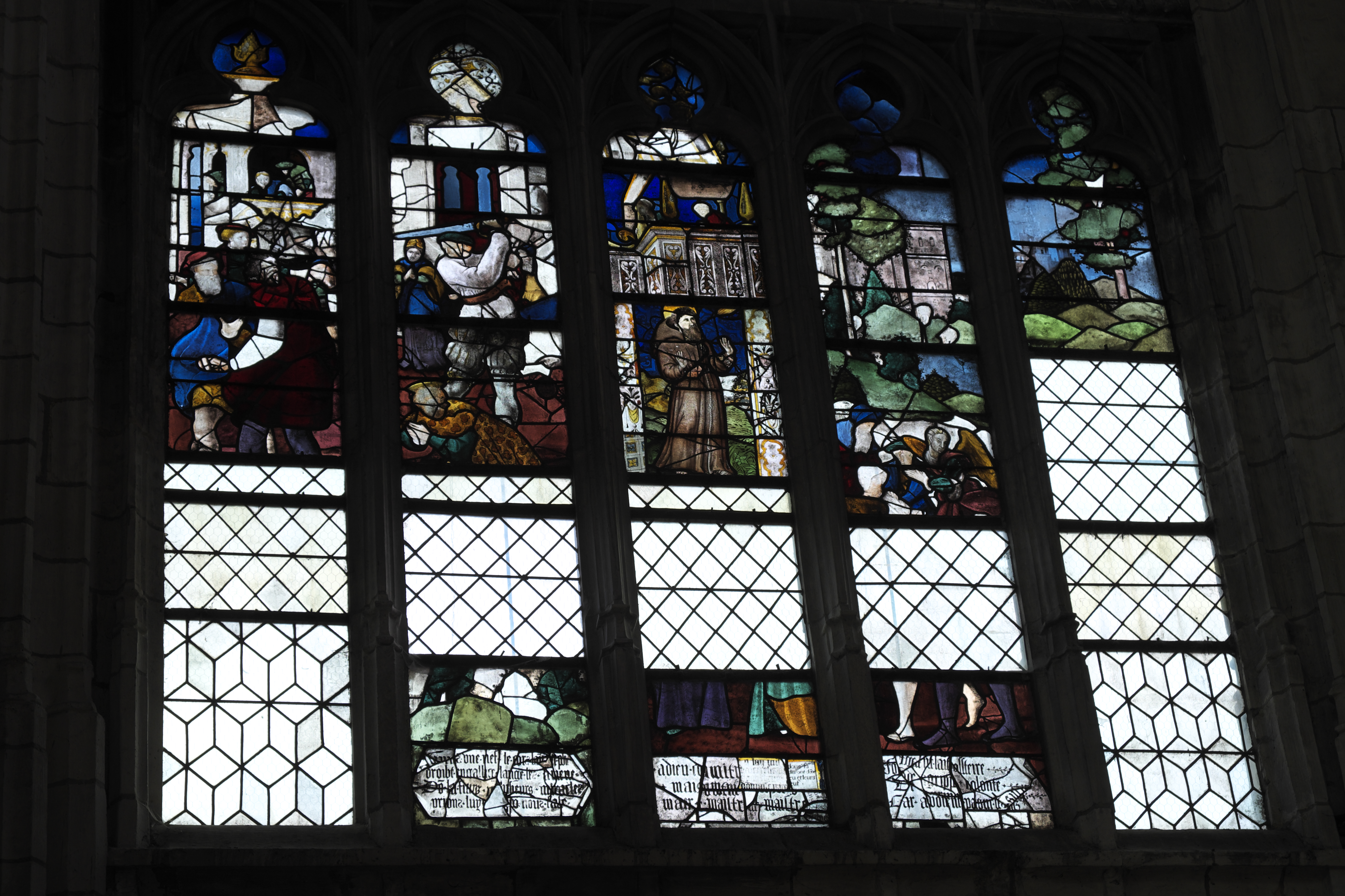 Katholische Kirche Saint-Pierre und Saint-Paul in Aumale im Département Seine-Maritime (Haute-Normandie/Frankreich), Bleiglasfenster mit Fragmenten aus dem 16. Jahrhundert